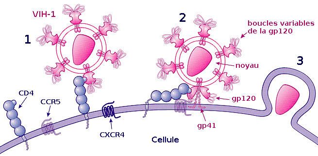 Processus d'attachement du VIH Légende : Fixation de la gp120 au récepteur CD4 Fixation d'une boucle variable de la gp120 au co-récepteur (CCR5 ou CXCR4) et fixation de la gp41 sur la membrane cellulaire Pénétration du VIH dans la cellule